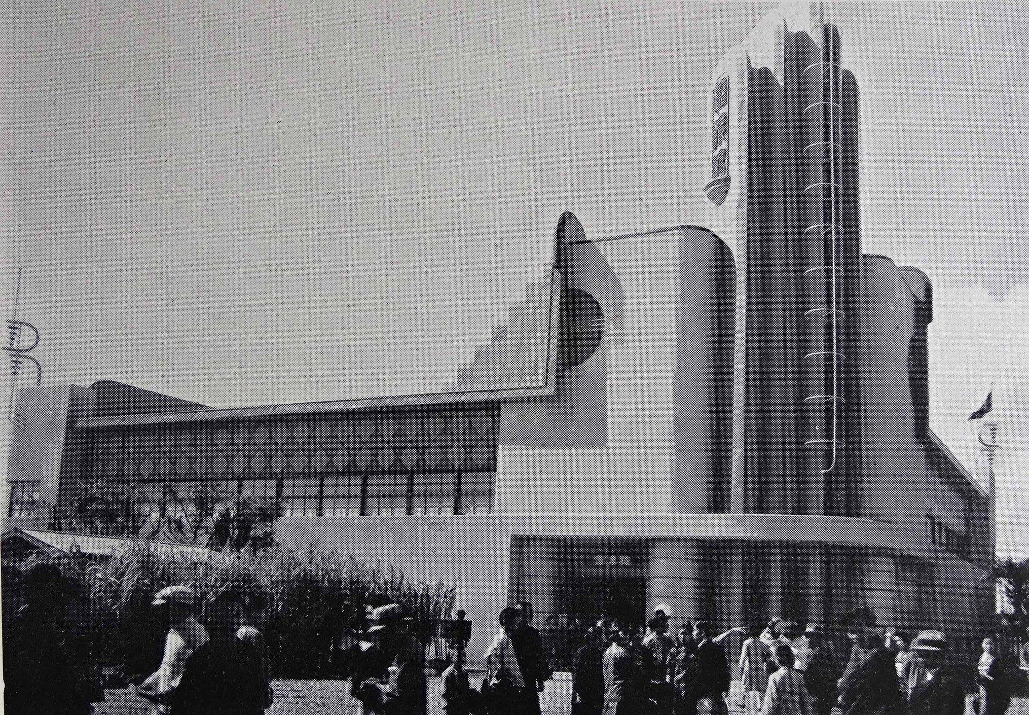 始政四十周年記念臺灣博覽會糖業館。